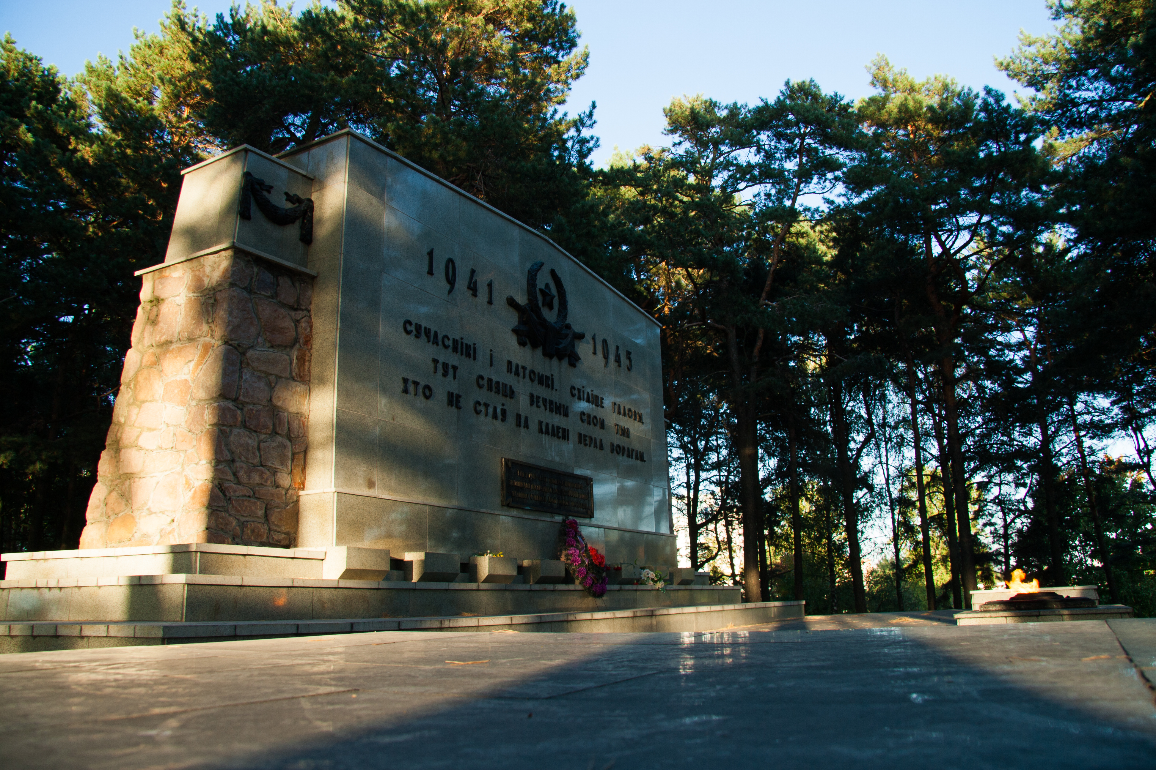 Беларуская (тарашкевіца): Тэрыторыя былога Масюкоўшчынскага лягера сьмерці. г. Менск This is a photo of Belarusian heritage monument. Reference number: 713Д000146 ( WLM)